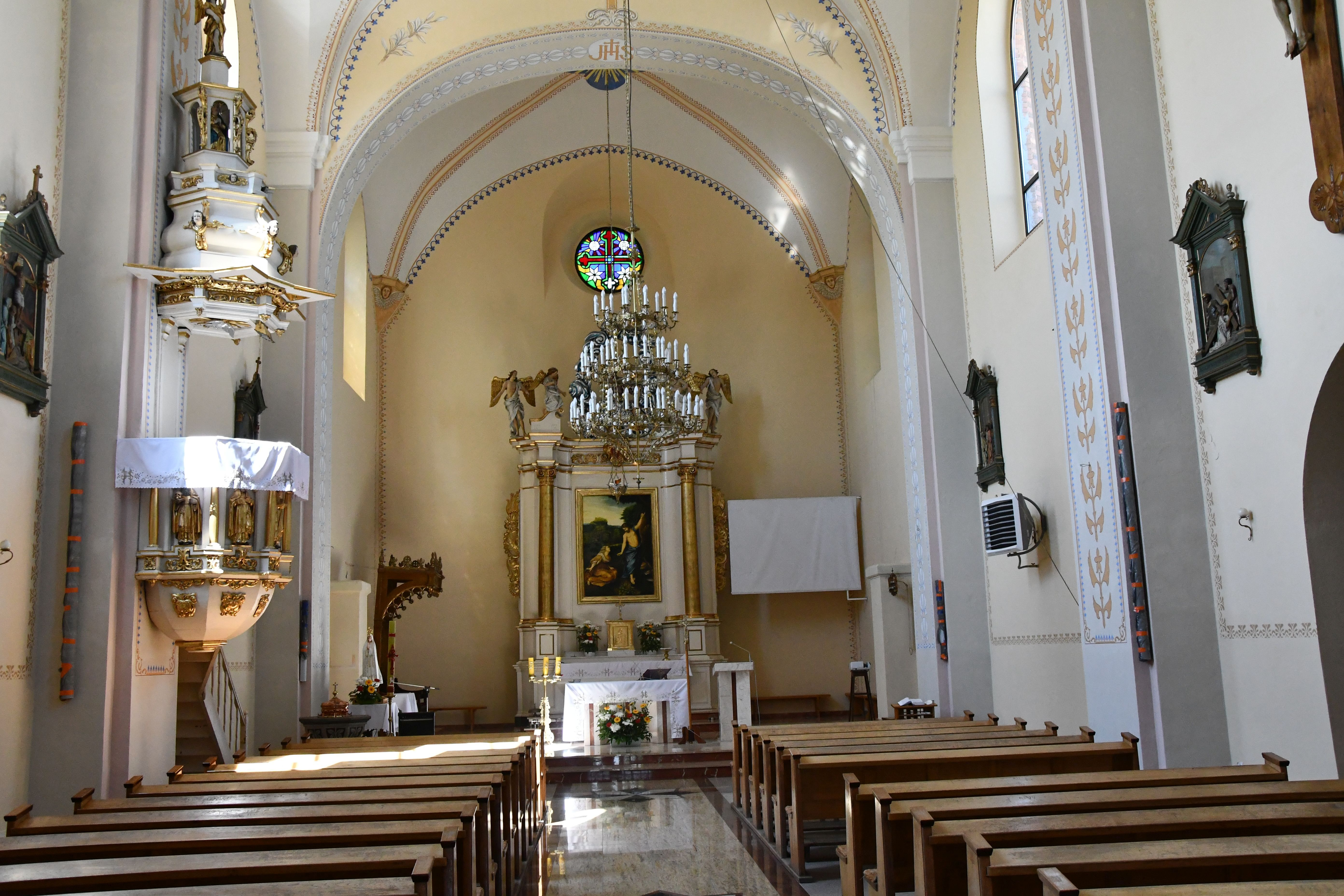 Ożarów wnętrze kościoła 2019